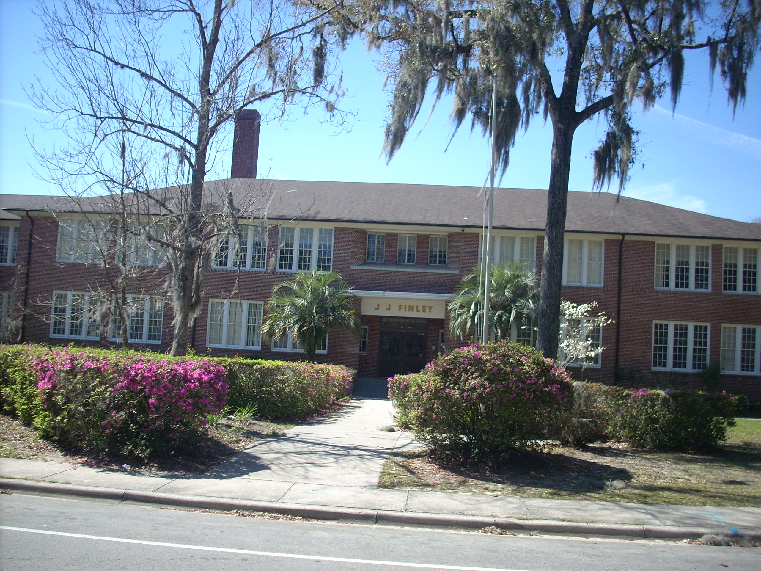 בית ספר בגיינסוויל, 2008